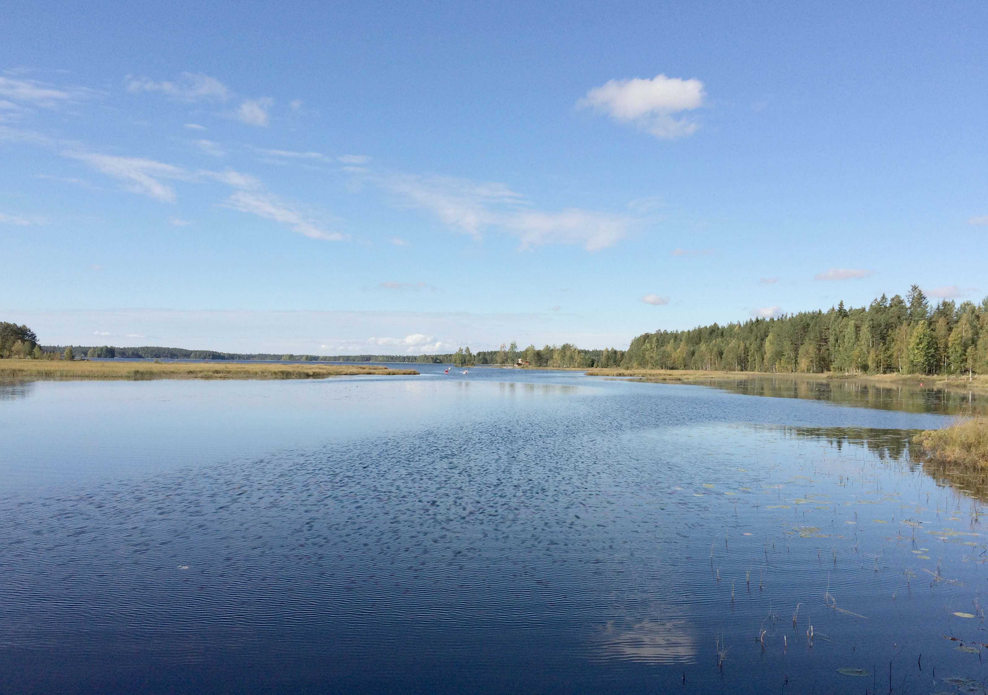 Rokosjøen vestover fra FV168